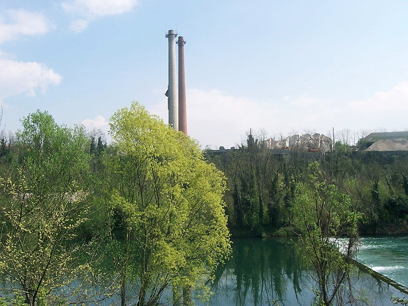 Palazzolo sull'Oglio - Ciminiere dell'Italcementi